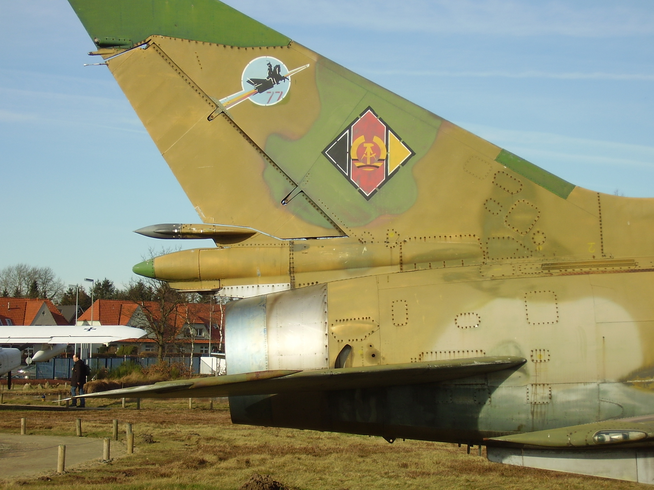 Aeronauticum in Nordholz, Luftschiffe, Zeppelin, bei Cuxhaven, Luftfahrtmuseum